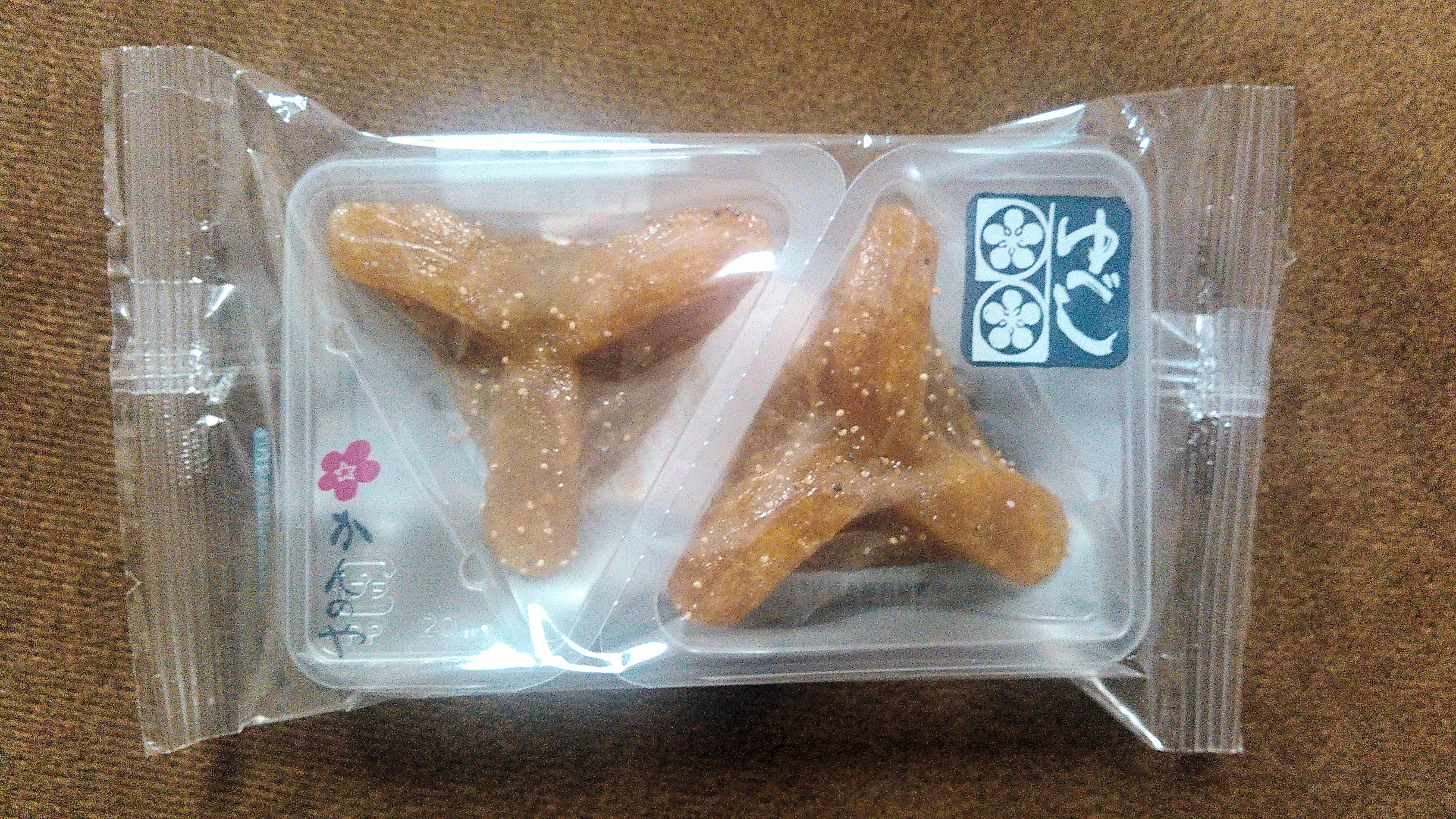 郡山市の かんのや 家伝ゆべし 内袋